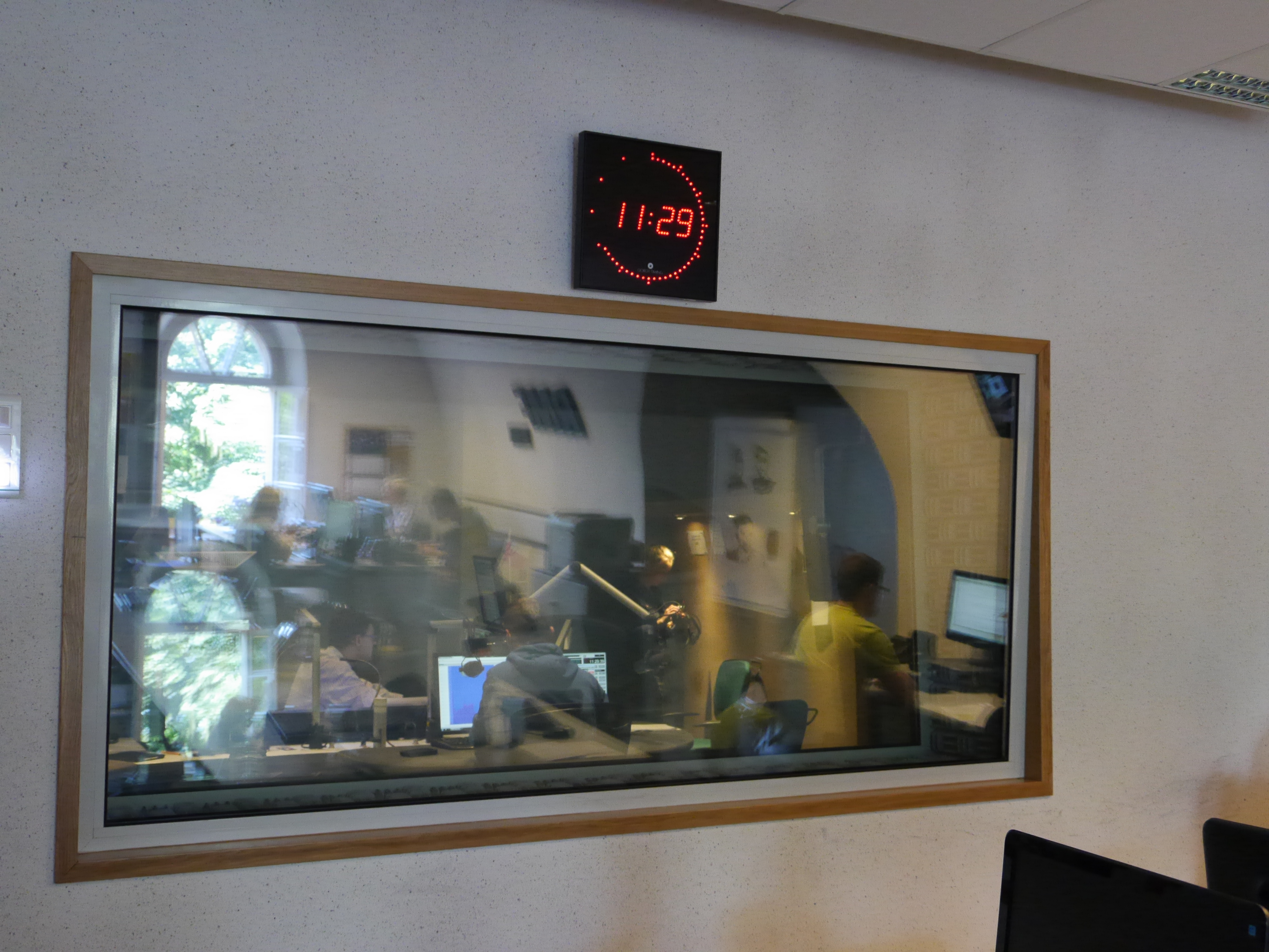 Siedziba radia RMF FM, al. Waszyngtona 1, 30-204 Kraków This photo was taken with Panasonic Lumix DMC-GH3 camera, thanks to Panasonic. You can see all photographs in category: Taken with Panasonic Lumix DMC-GH3.